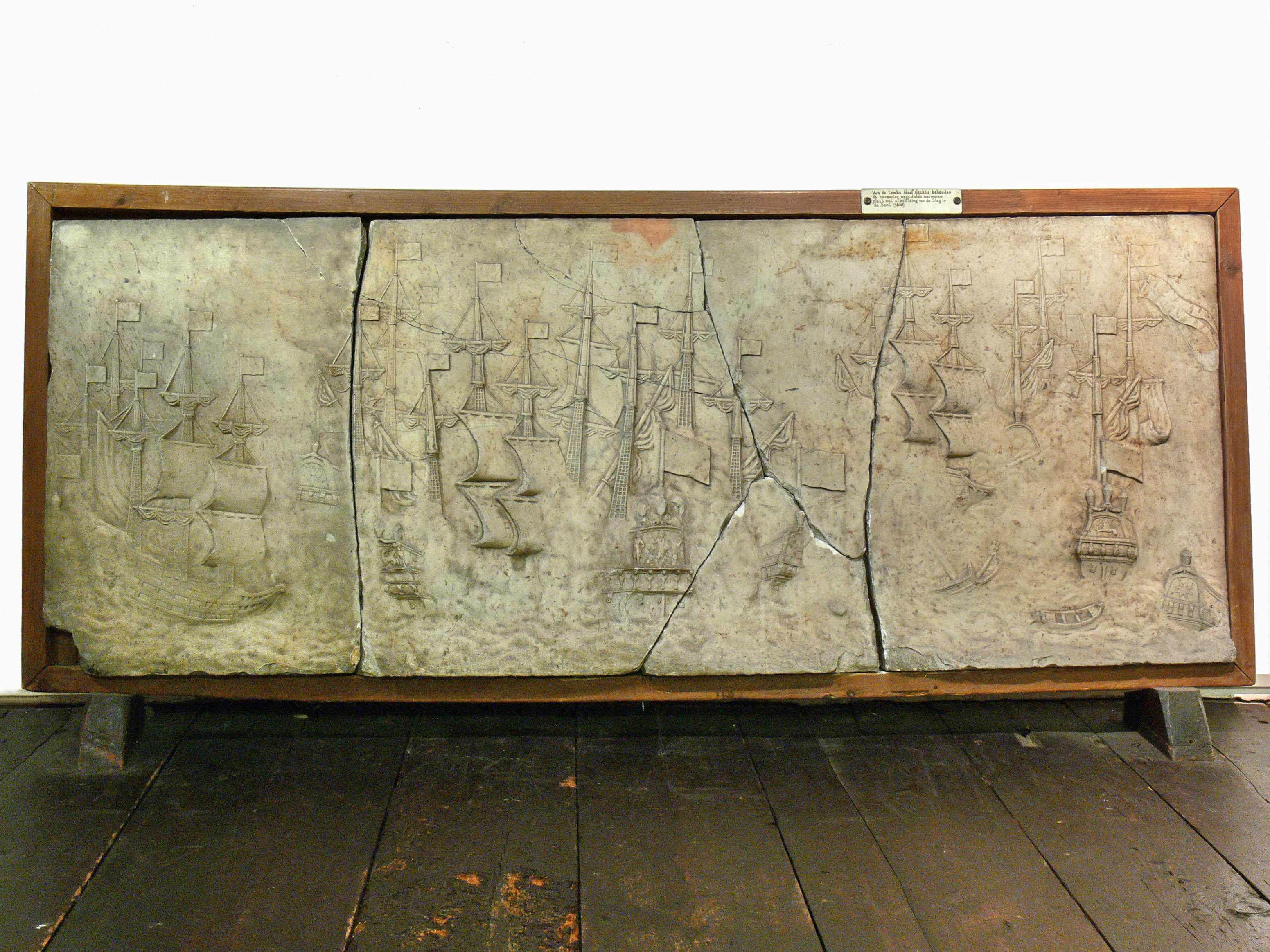 Overblijfsel van het praalgraf van Pieter Florisz (1606-1658) na een grote brand in de grote kerk in Hoorn in 1838. Deze gebarsten marmeren afbeelding van de fatale Slag in de Sont (1658) en de houten deksel van zijn doodskist is alles wat er van overgebleven is.